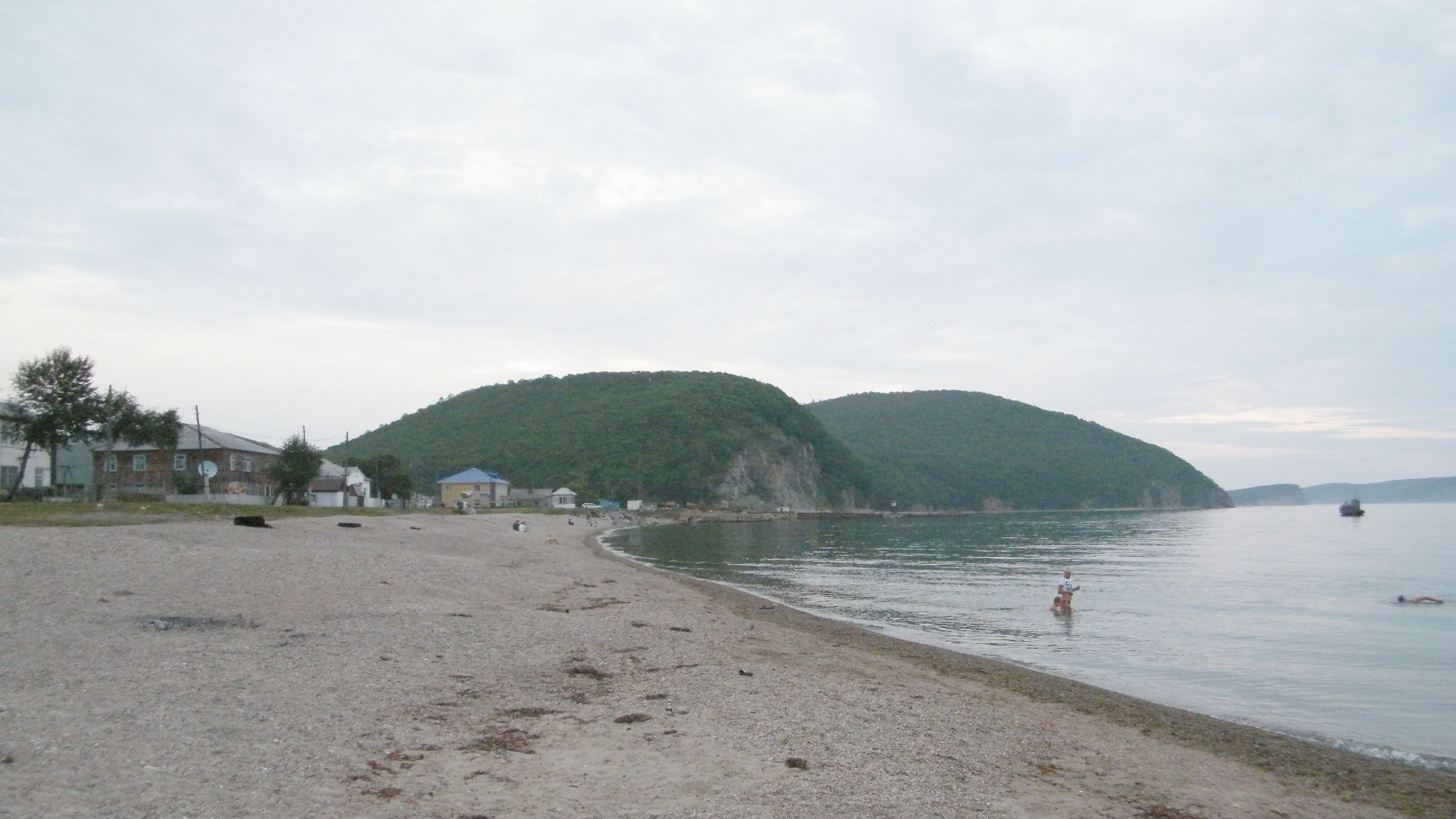 Приморский край, залив Владимира, бухта Северная, село Веселый Яр.